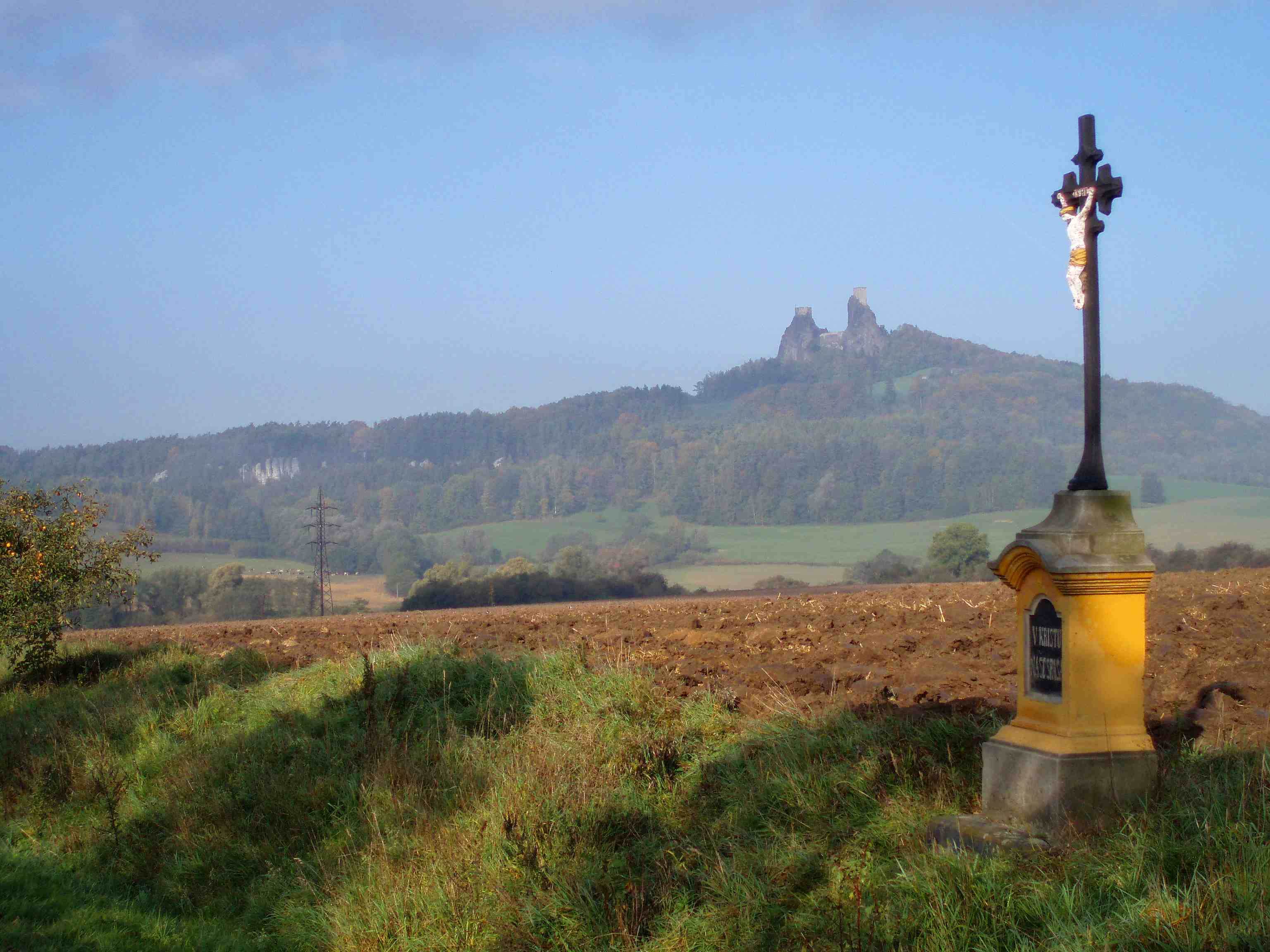 Kruzifix am Weg nach Trosky